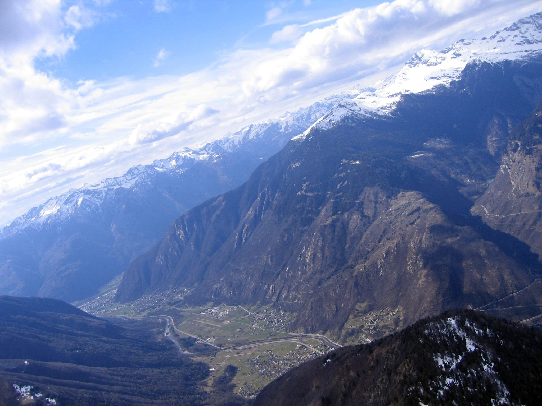 Roveredo,San Vittore,Lumino,Castione.